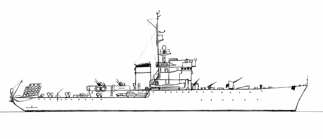 Итальянский корвет времен Второй мировой войны, тип "Габбиано"